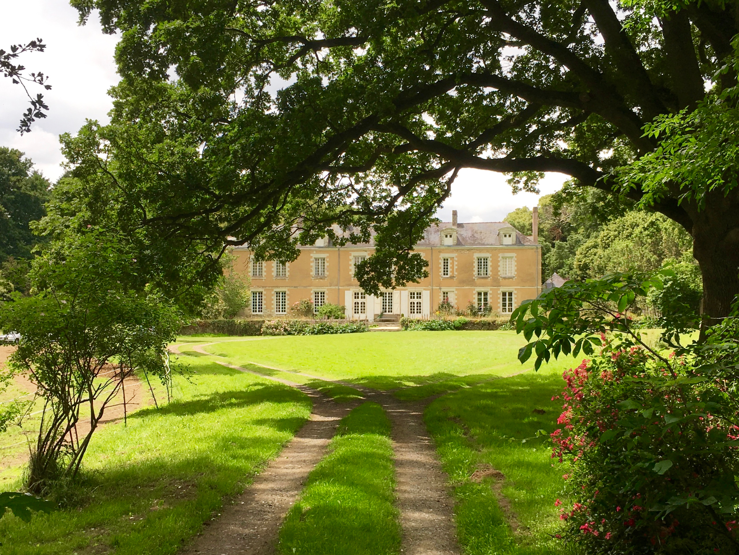 Façade principale du Château de Launay masquée par les arbres.